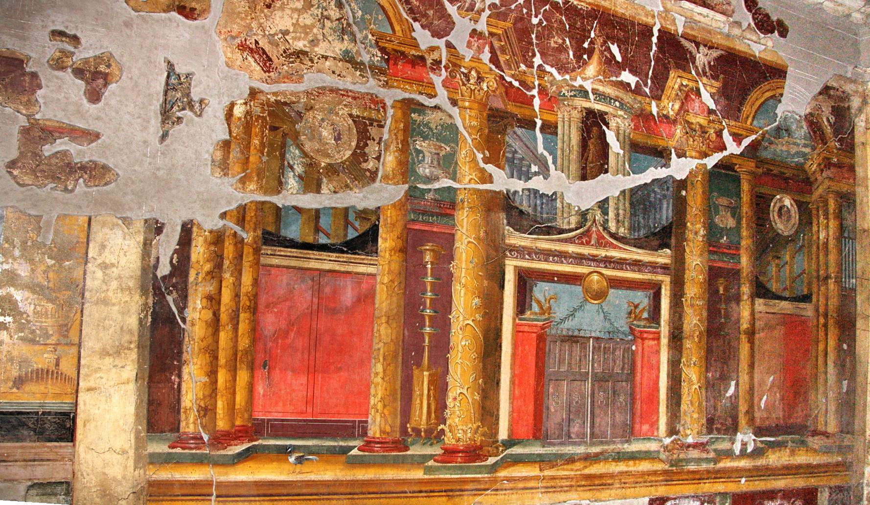 Fresc de la paret oest del Triclinium de la Vil·la Popea a Oplontis (Itàlia).